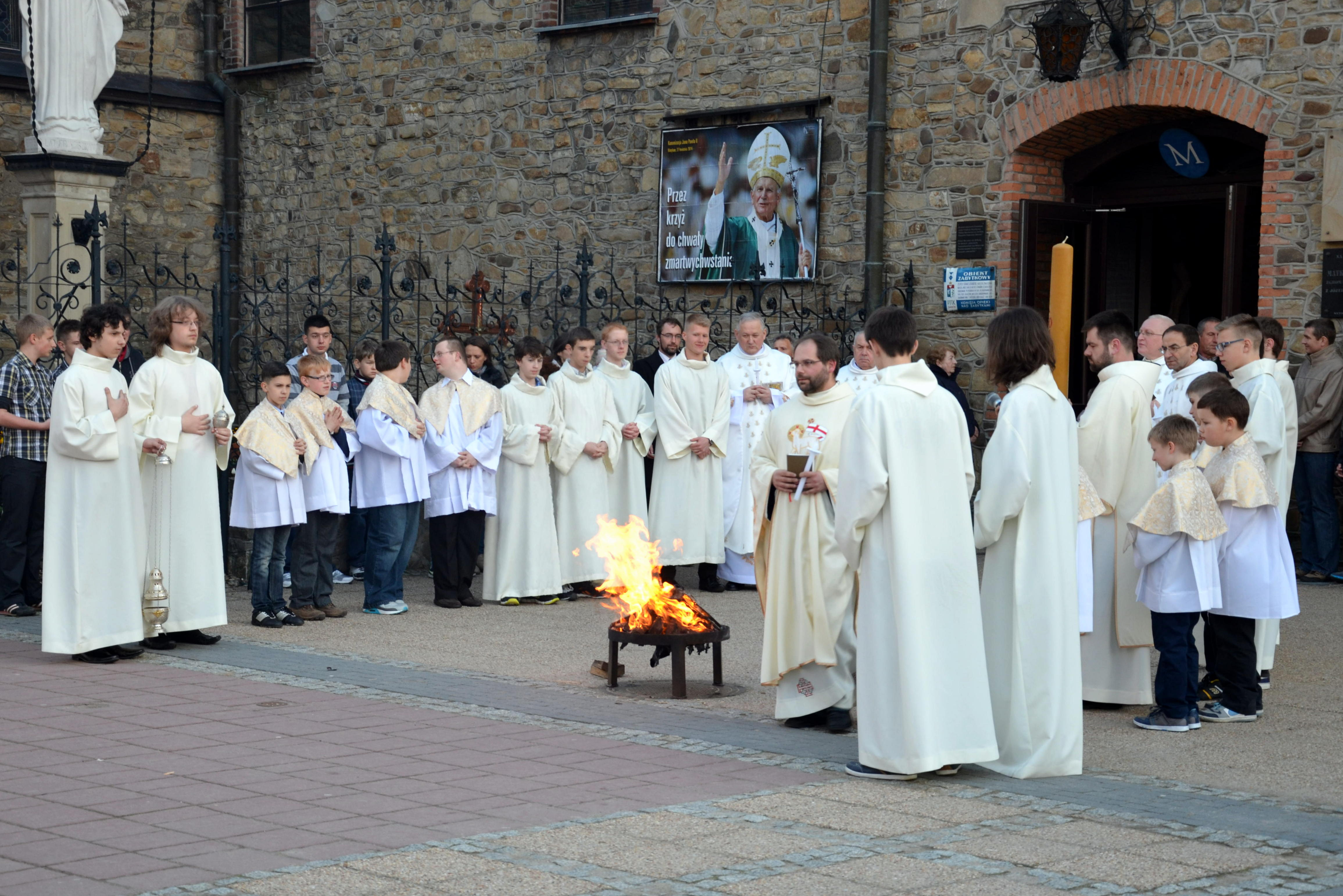 Osterfeuer an der Franziskanerkirche in Sanok